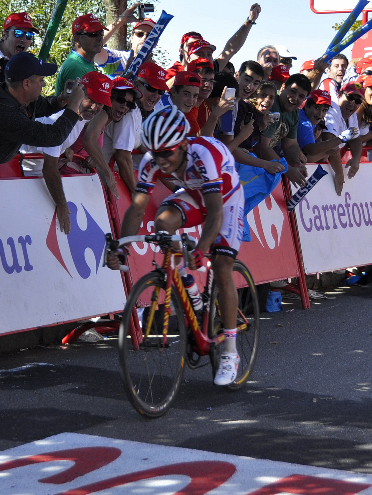 A punto de pasar la línea de meta.